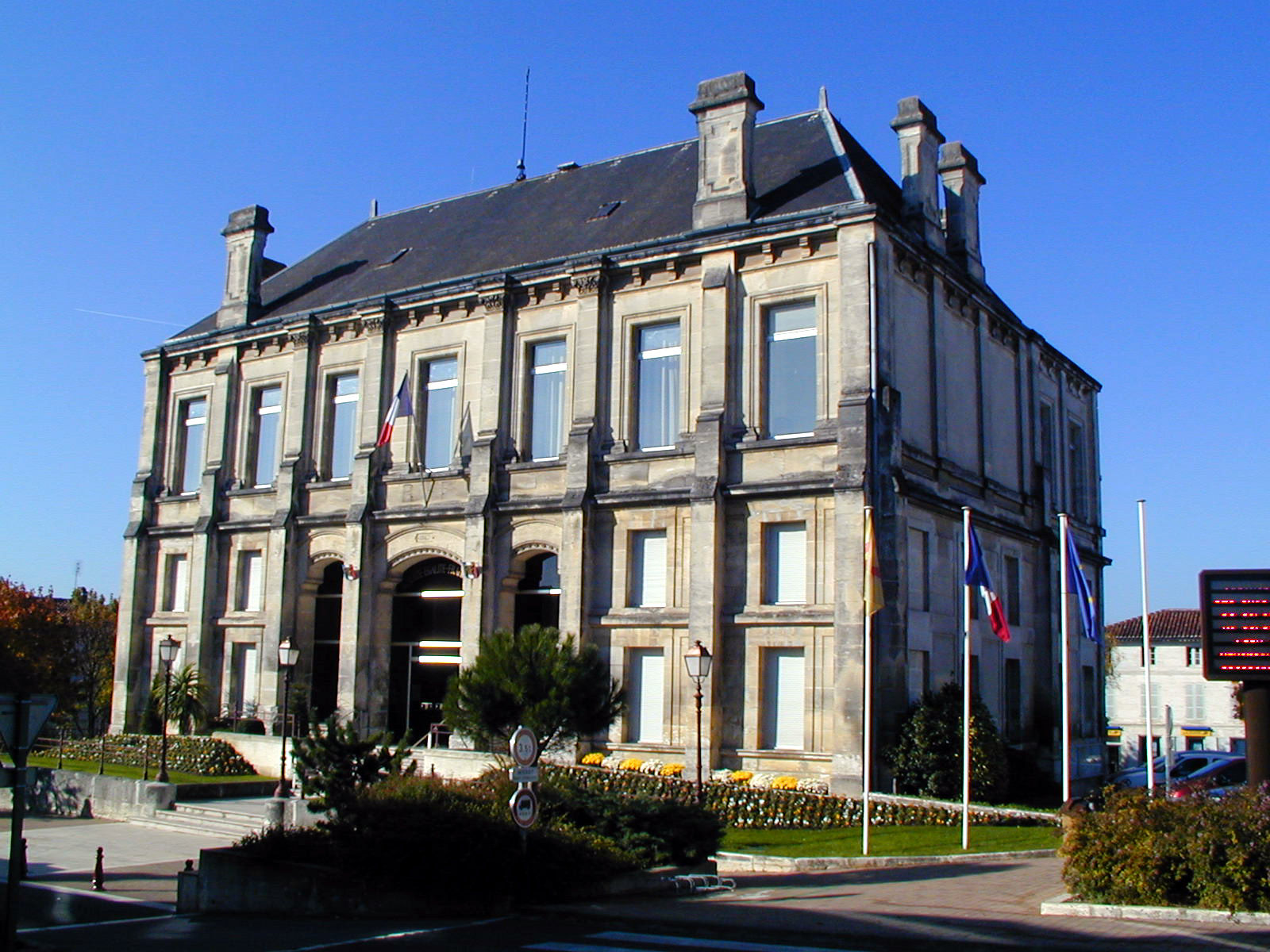 Mairie de Jarnac (Charente) France